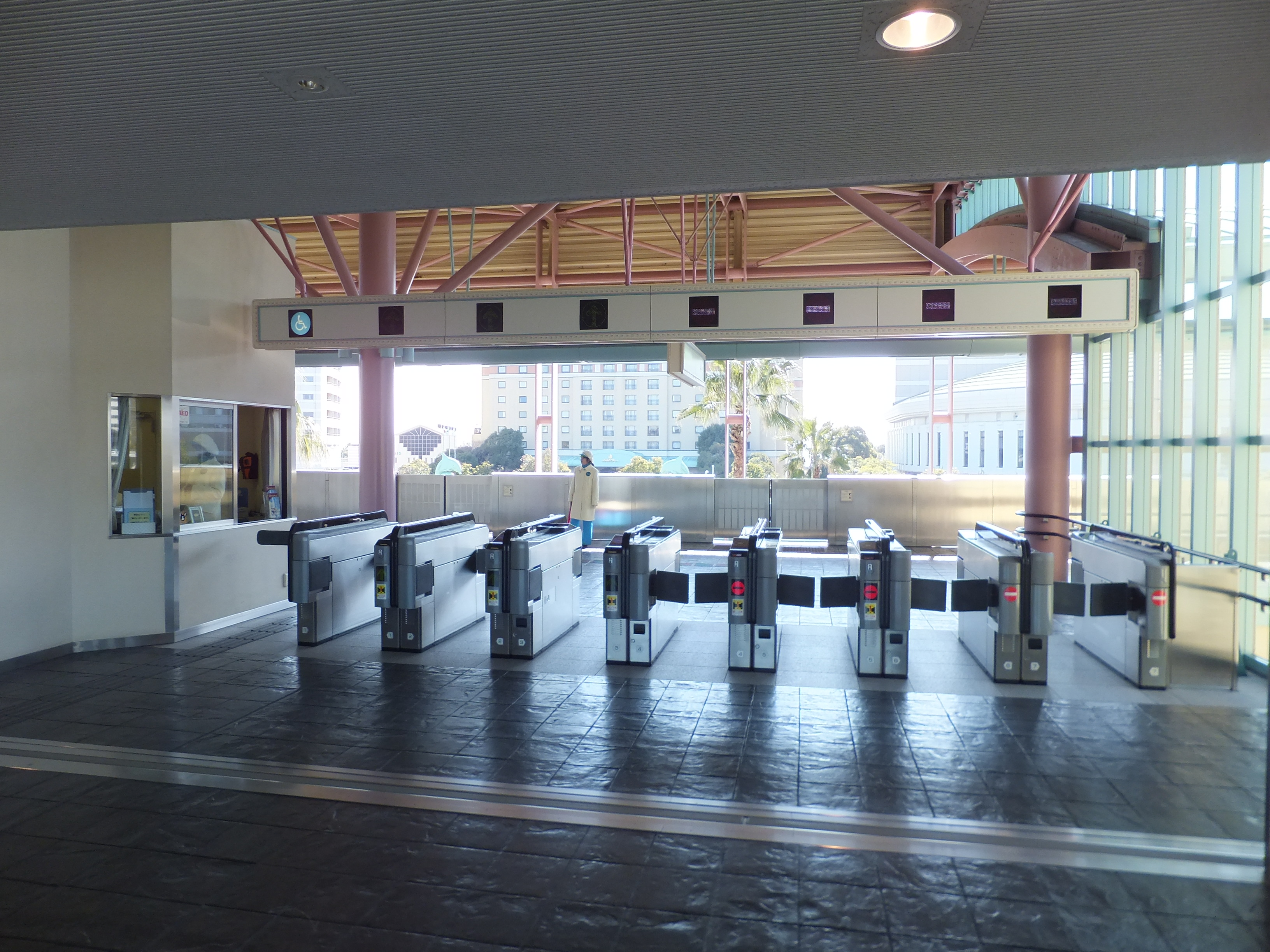 ディズニーリゾートラインベイサイド・ステーション駅改札